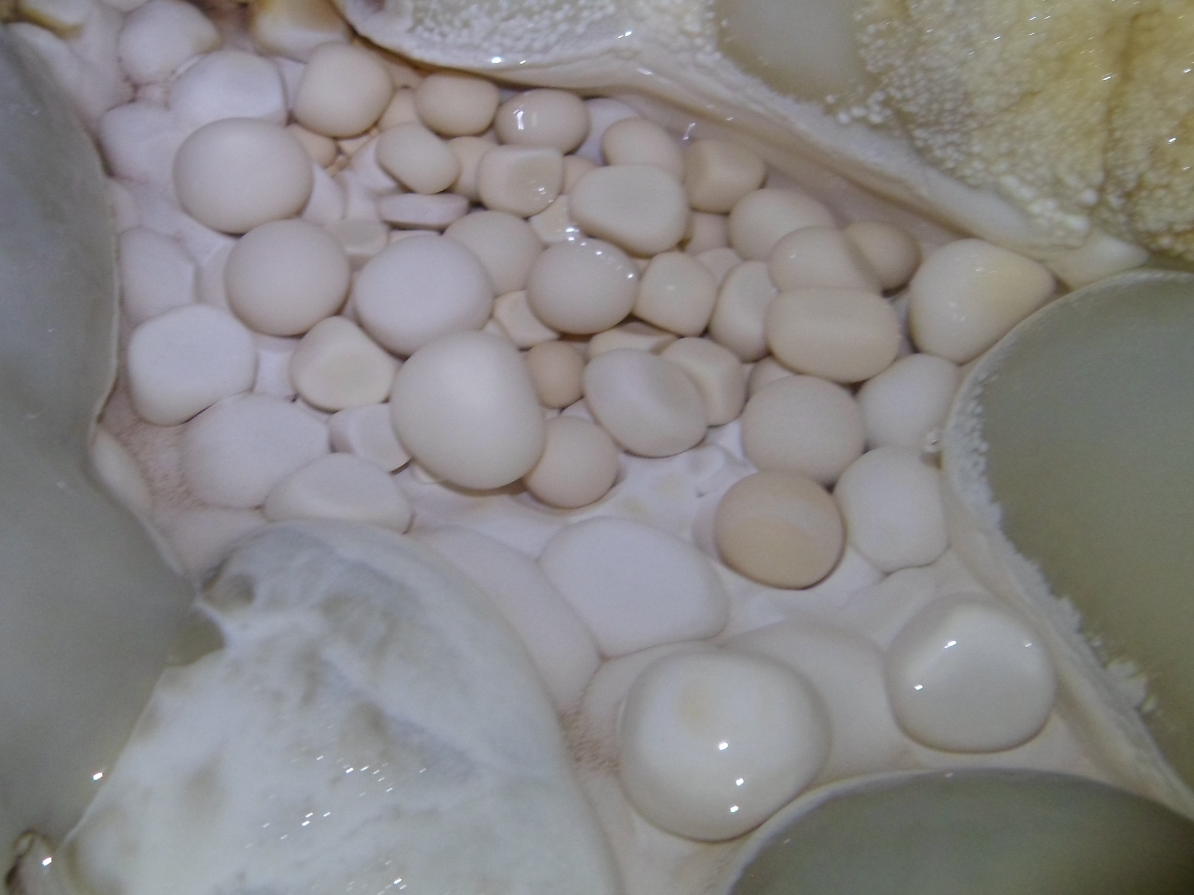 Vu sous la Chartreuse dans une ancienne carrière de molasse